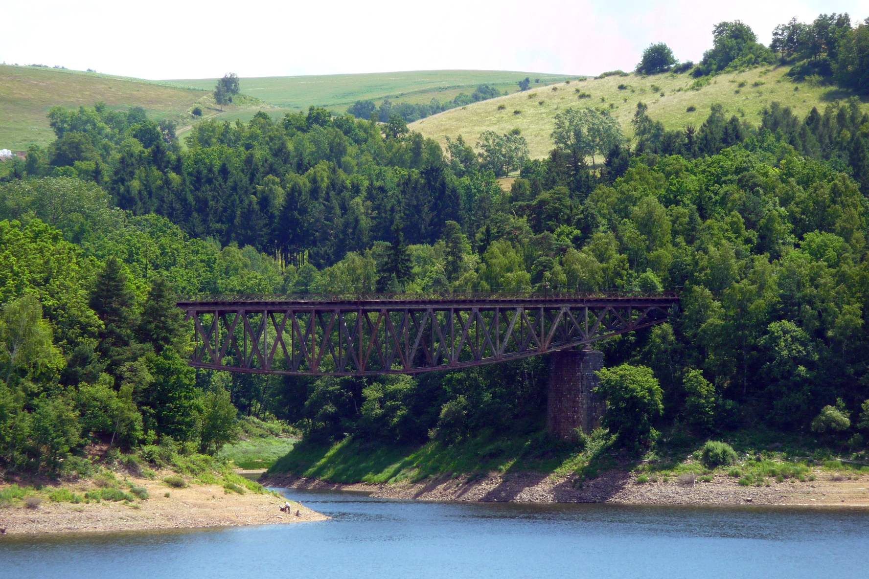 Pilchowice, most kolejowy z odwróconym przęsłem